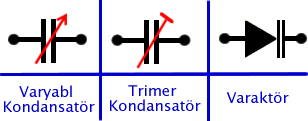 Varyabl Kondansatör Simgeleri